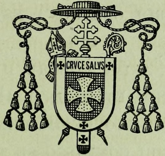 Escudo del arzobispo Ricardo Casanova y Estrada.